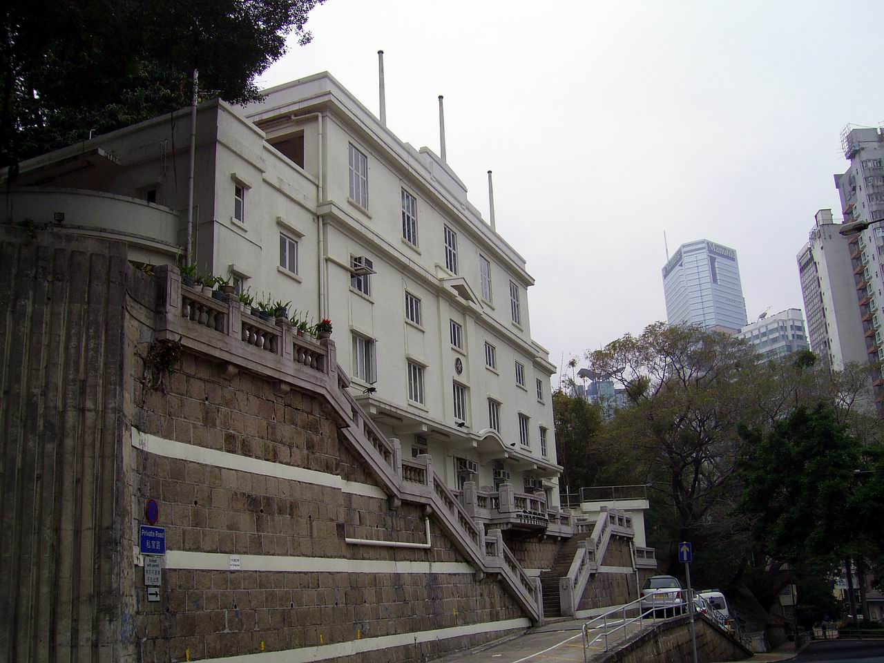 香港聖約翰救護機構港島總區總部